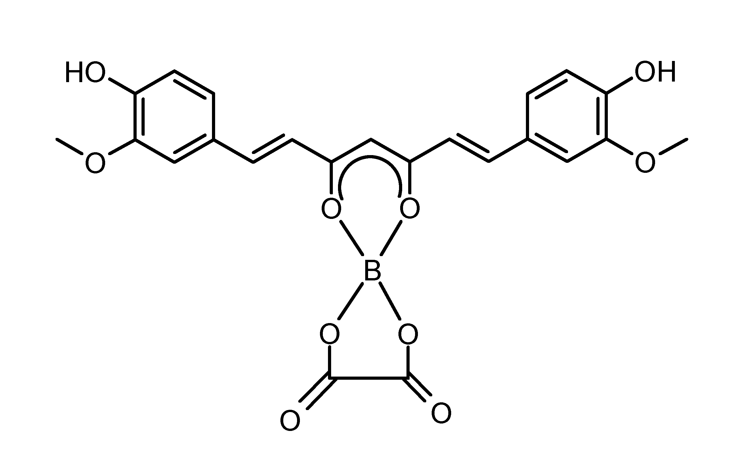 rubrocurcumin, structural formula